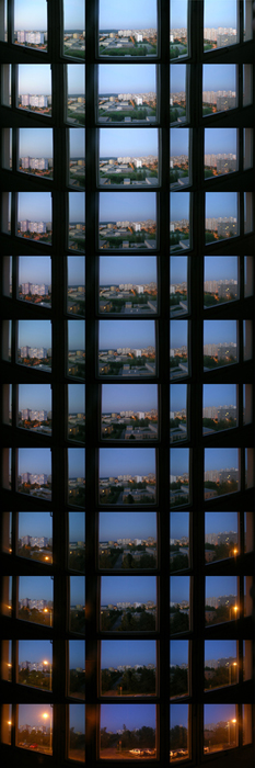 Fotografie Sylvy Francové; Sylva Francová´s photographs Neměňte rozlišení. Don´t change resolution!